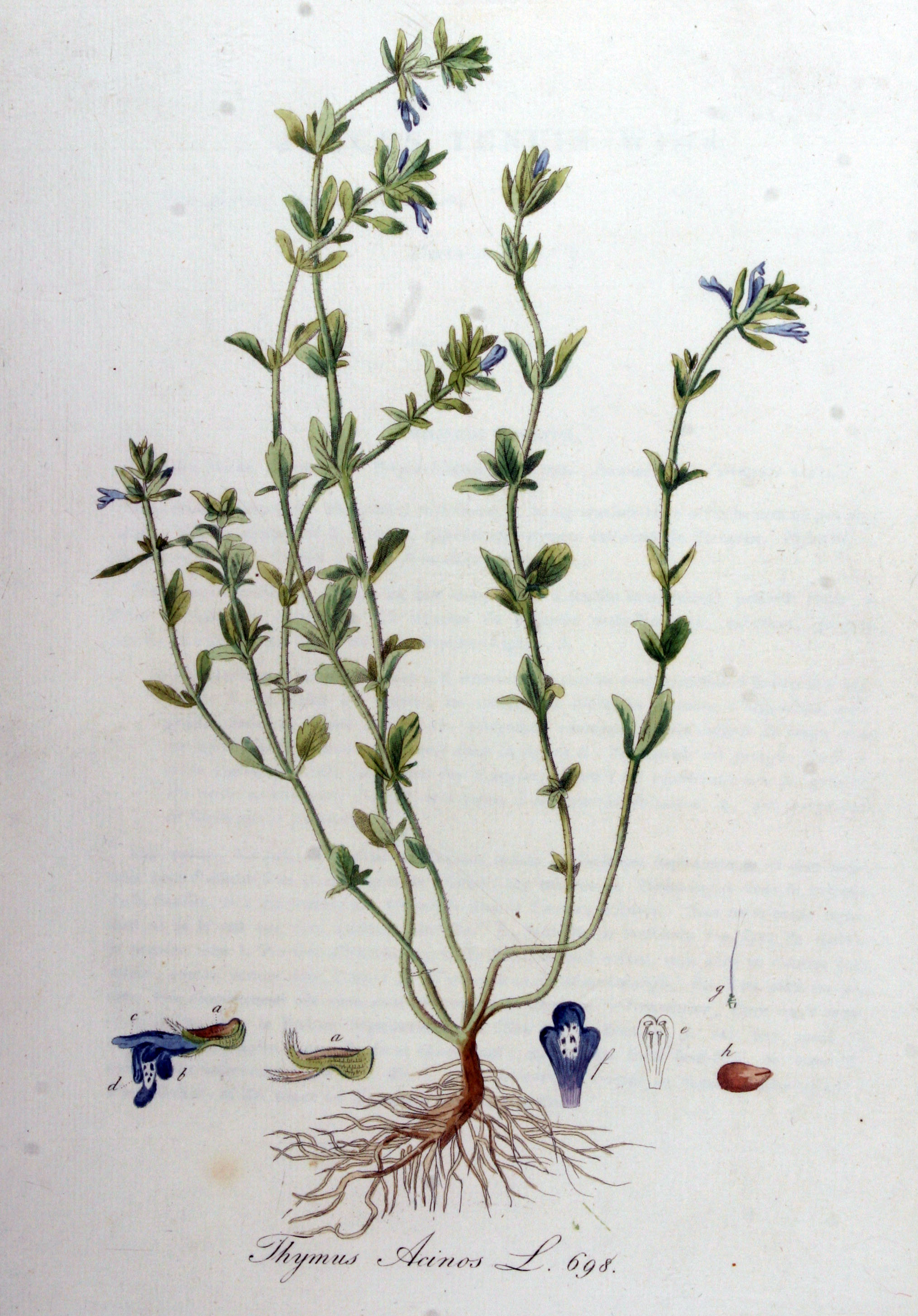 Acinos arvensis (Lam.) Dabdy (Syn. Thymus acinos L.)